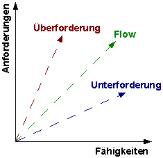 Diagramm zu Flow (Psychologie) Autor: C.Löser Erstellt mit: de